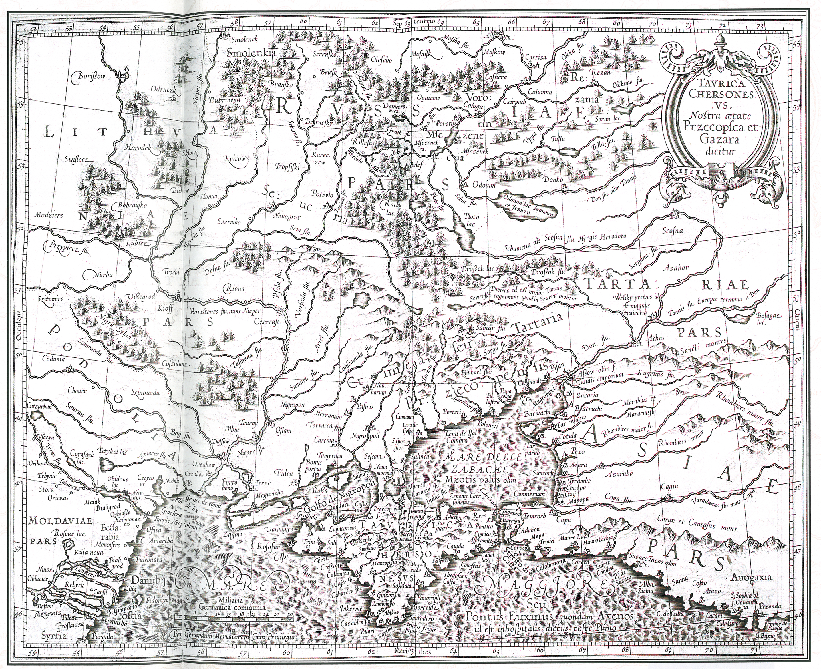 Таврика Херсонесская, сейчас Перекопская или Газара. Голландская карта ru:1630 года (Амстердам).